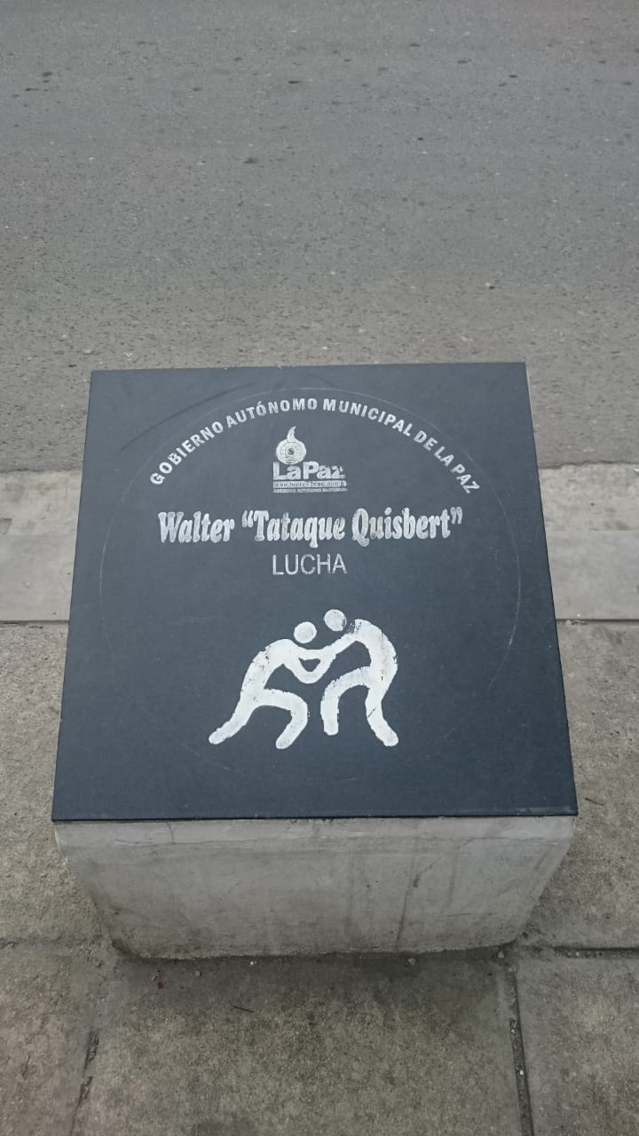 placa